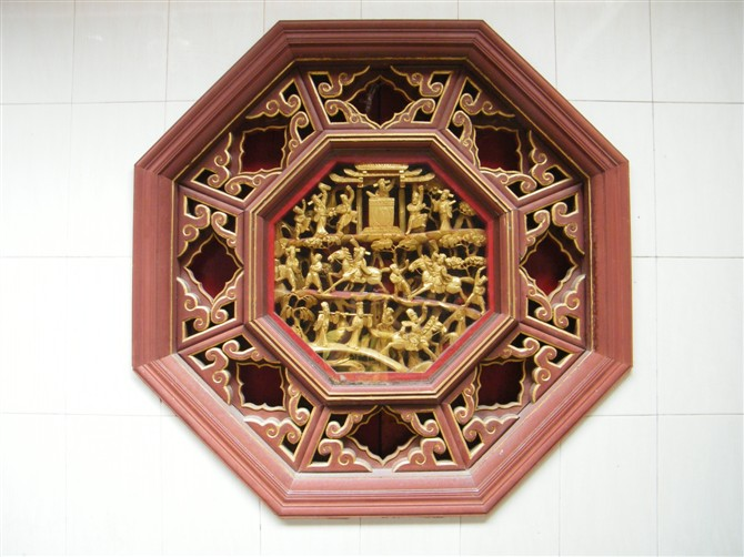 巡司埠神农古庙窗棂 2009.8.3